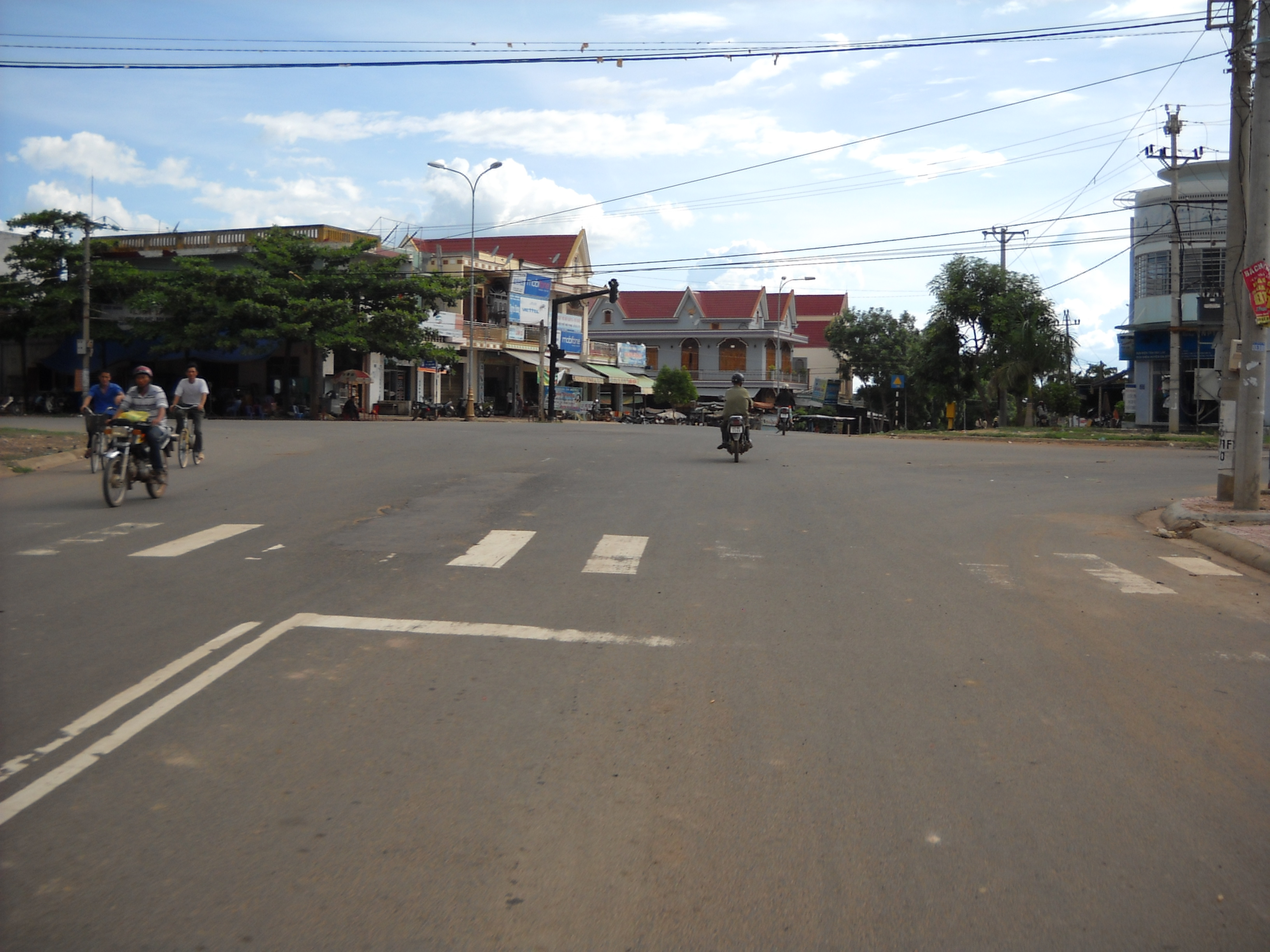 Thị trấn Ea Súp